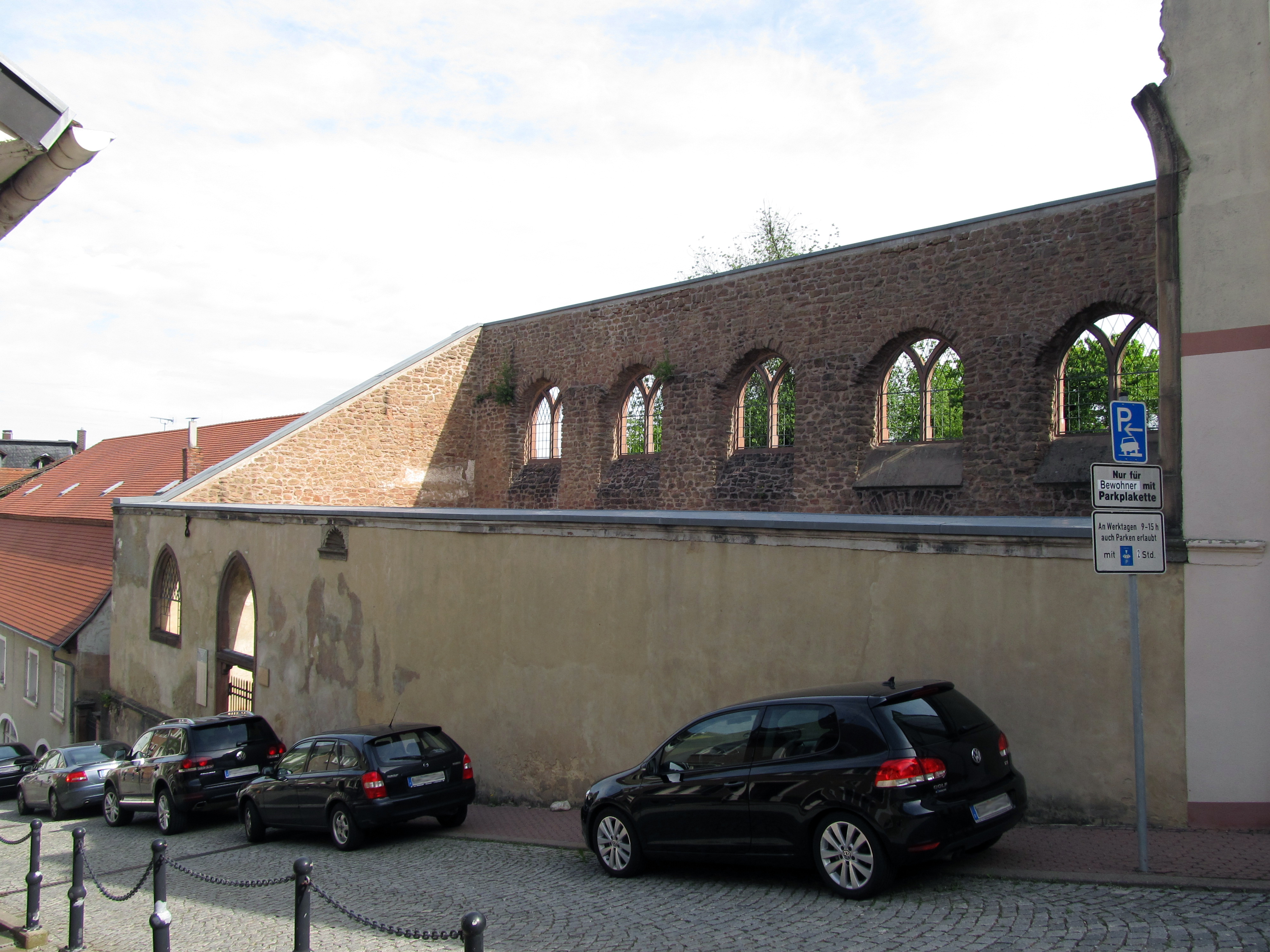 Ruine der ehemaligen Franziskanerkirche (1697–1699 erbaut), ab 1860 Homburger Synagoge in der Klostergasse